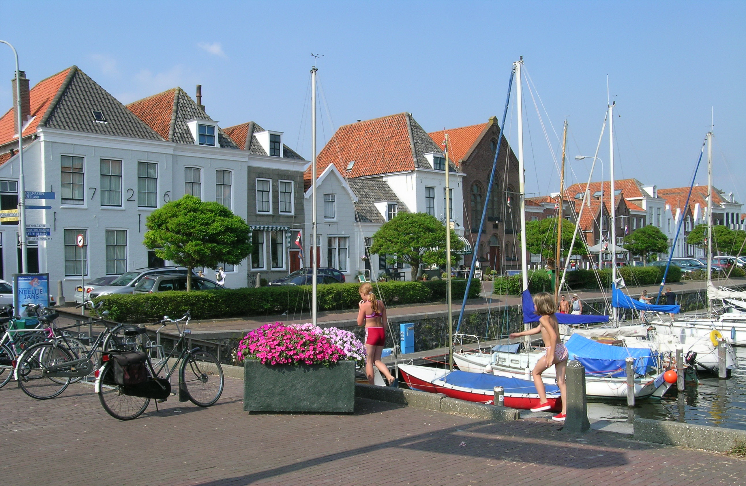 Brouwershaven (NL) am Hafen